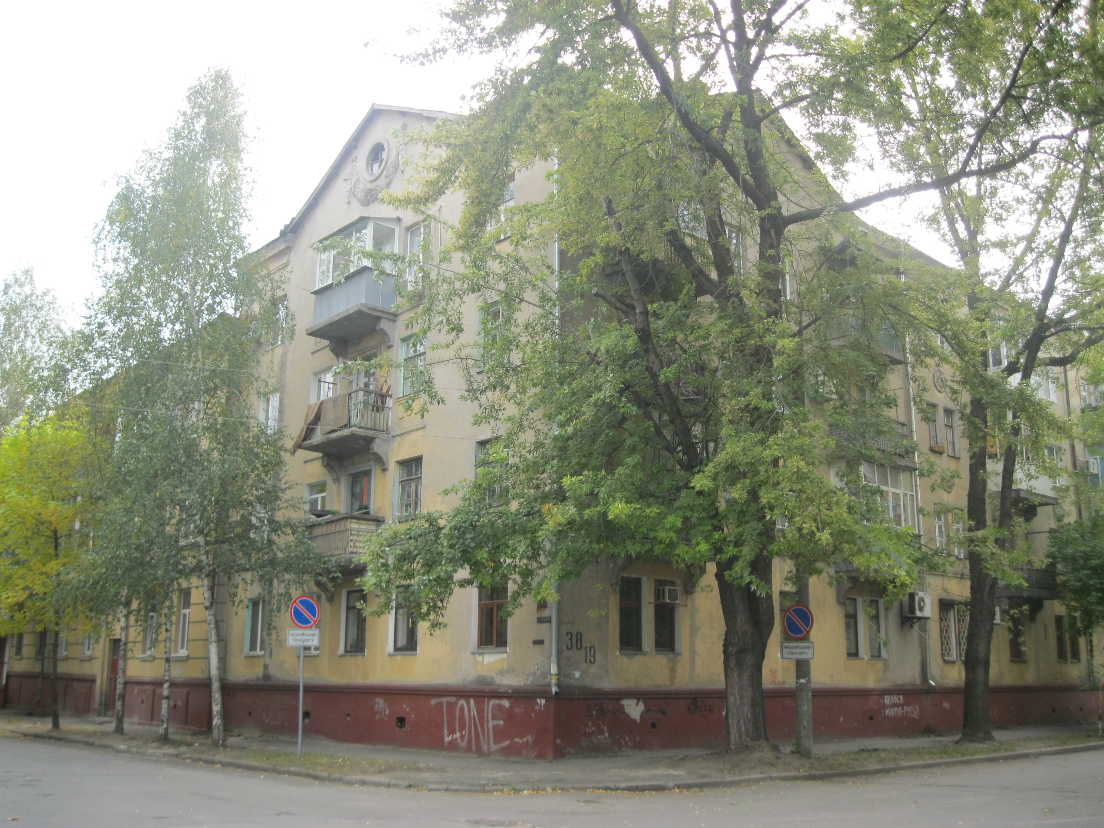 Житловий будинок, Кременчук, Вул. Софіївська, 38/19